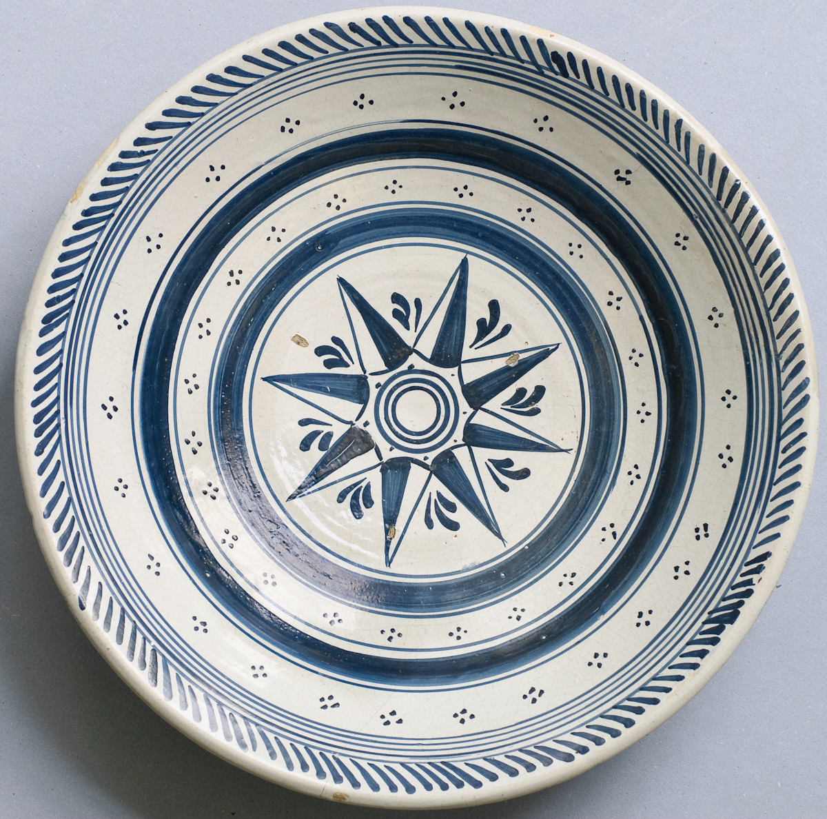 schotel (majolica) met ster, Makkum (Tichelaar), 2de kwart 19de eeuw, schilder: Hendrik Bastiaans de Haan; diam.37½ cm